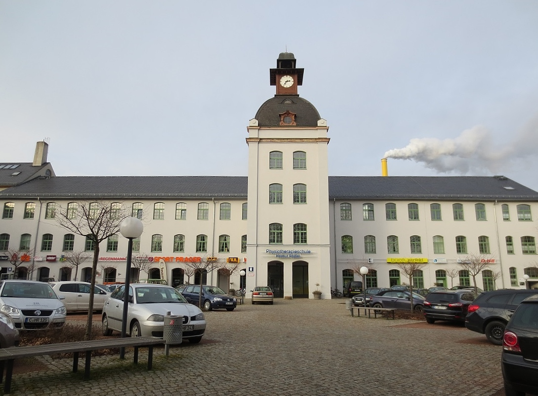 Kulturdenkmal Chemnitz/Schloßchemnitz.